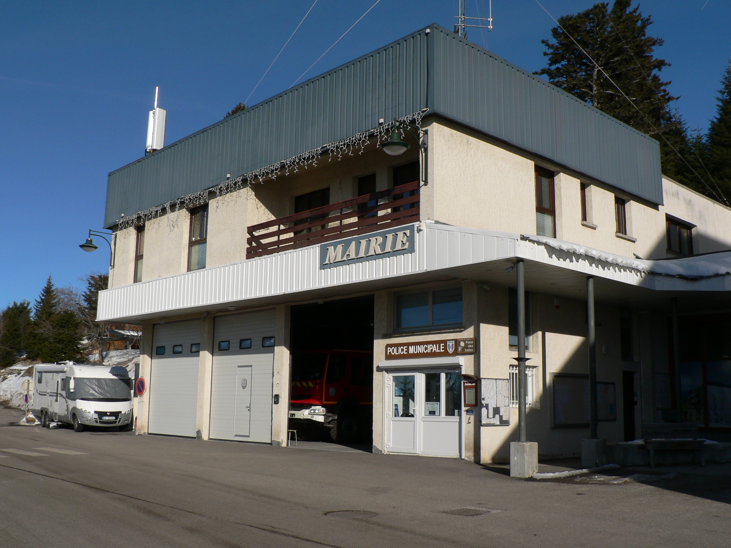 La mairie et l'office de police à Chamrousse, Isère, AuRA, France.